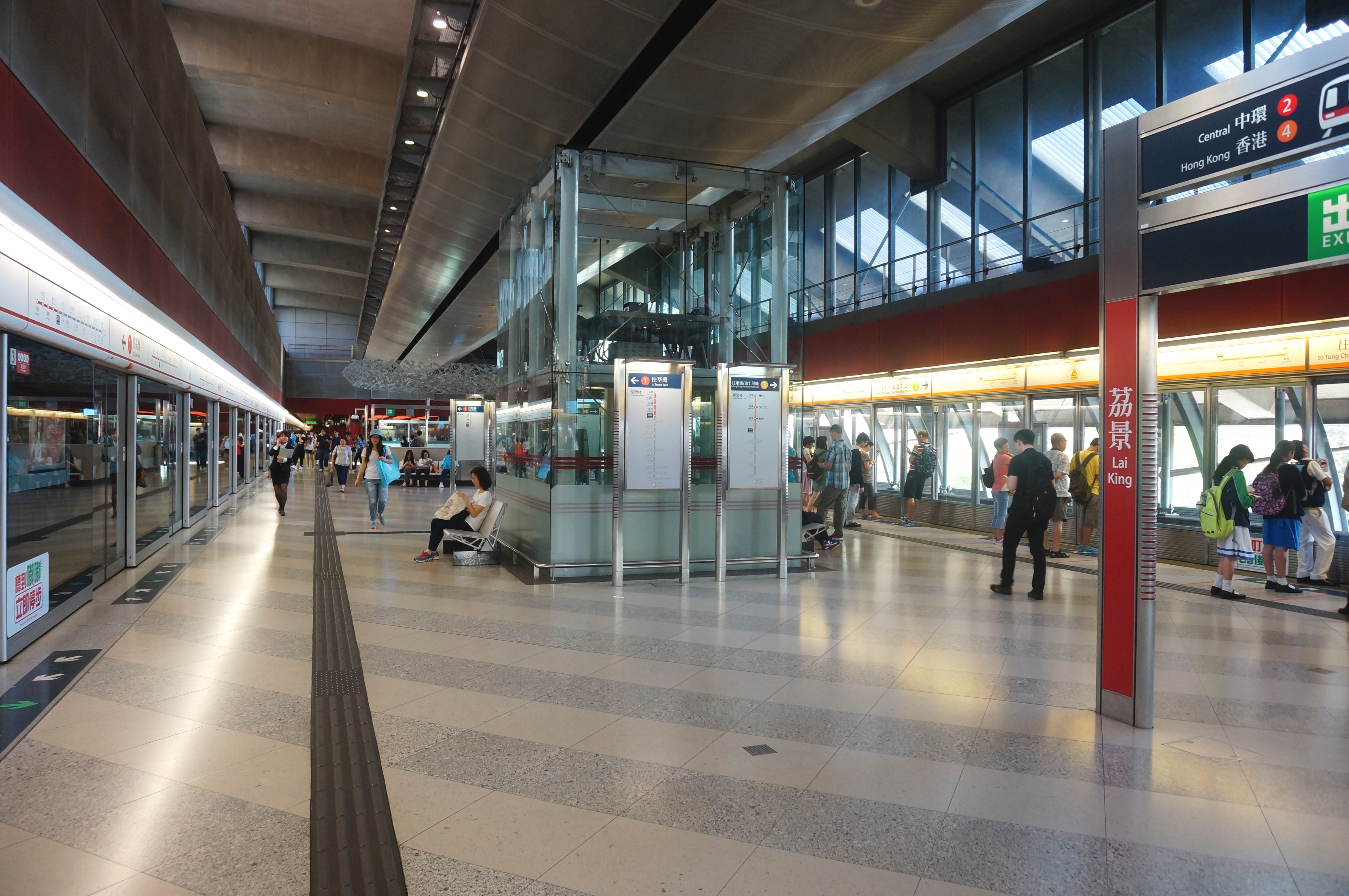 港鐵荔景站月台